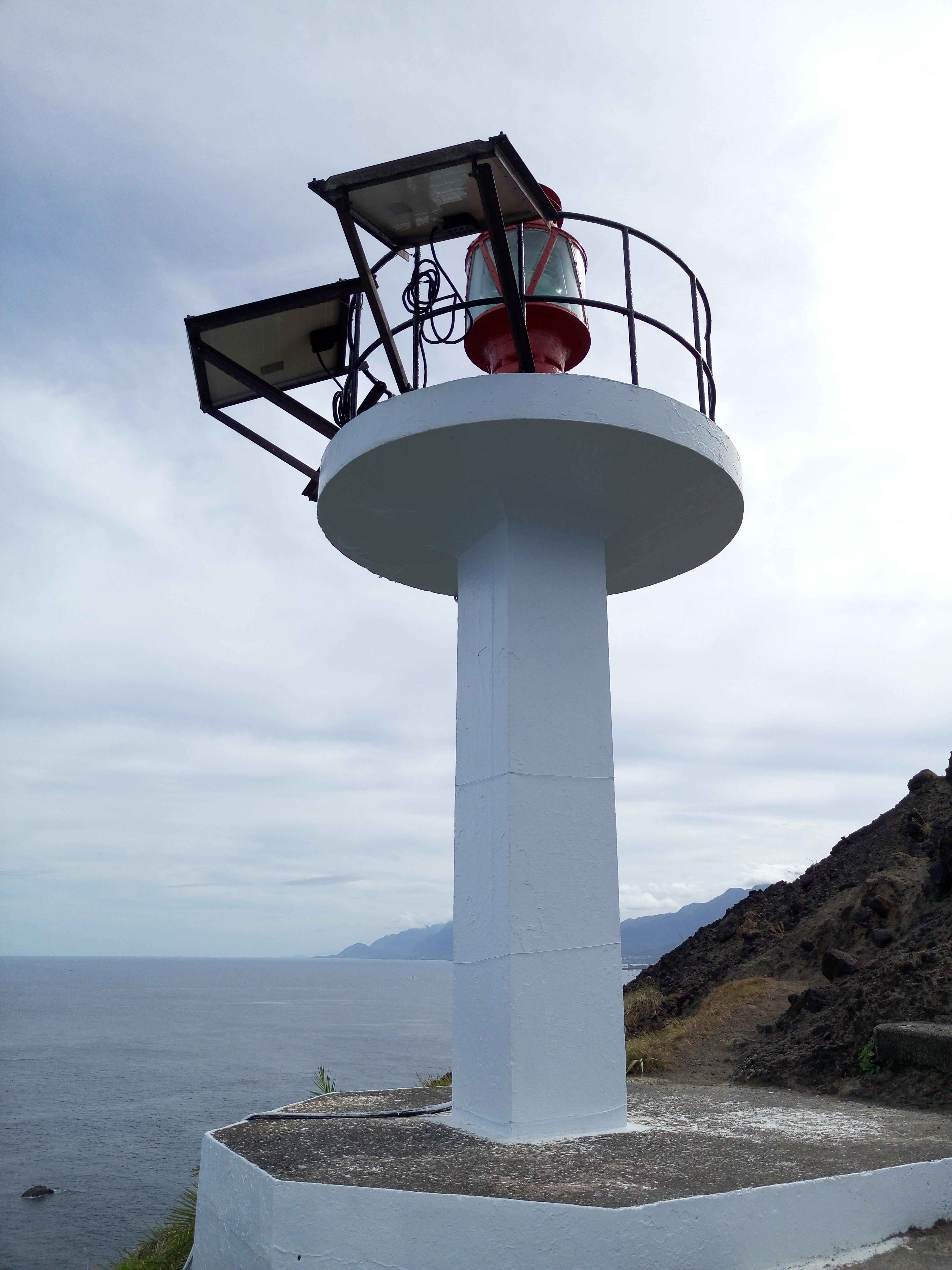 臺灣臺東成功鎮三仙台燈杆